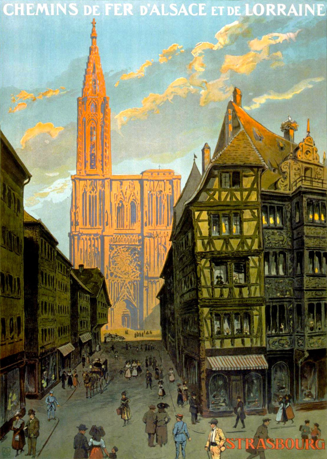 Chemins de Fer Alsace Lorraine affiche cathédrale Strasbourg, auteur inconnu